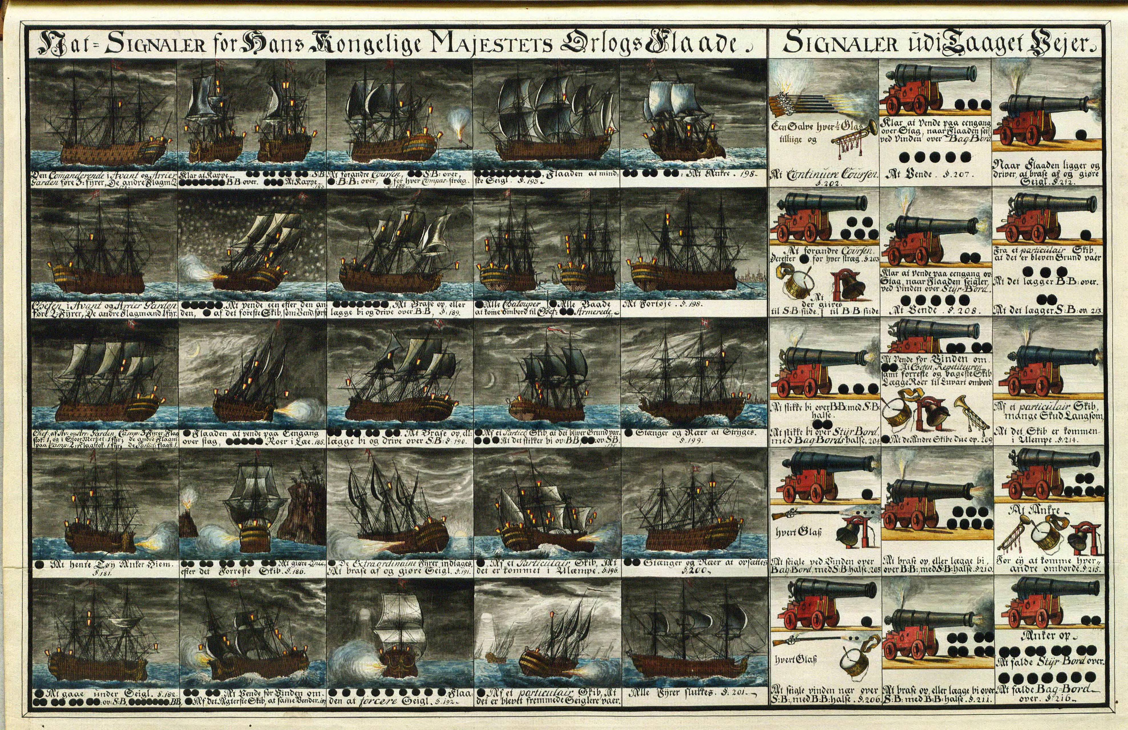 Tafel mit Signalen auf Schiffen